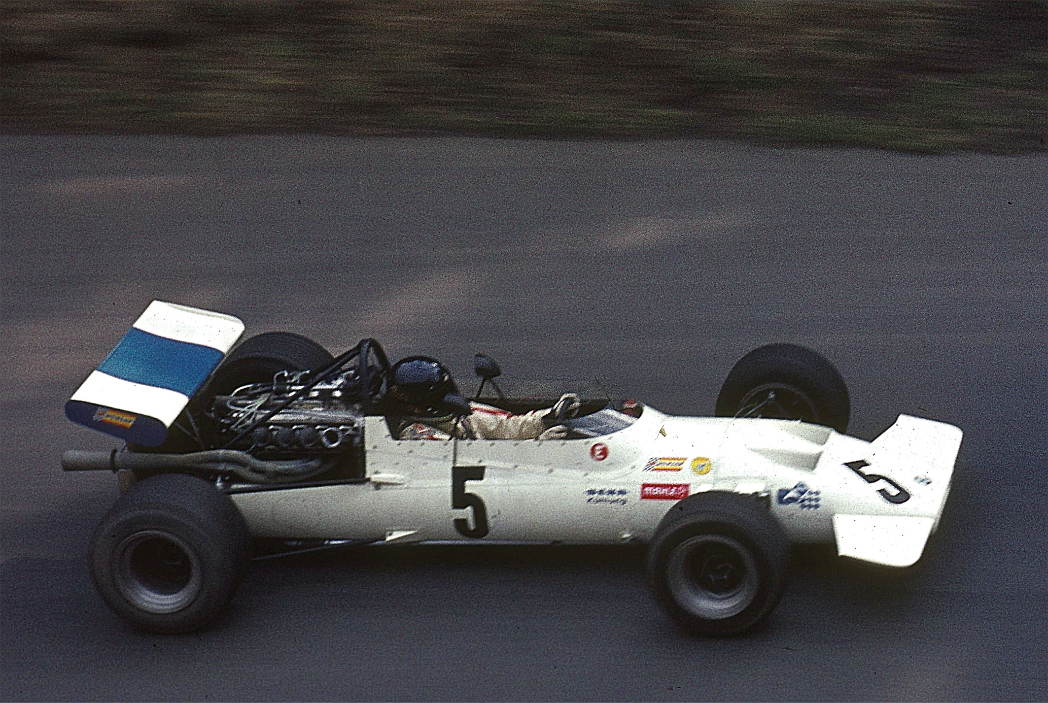 Dieter Quester im Formel 2 (BMW 269)